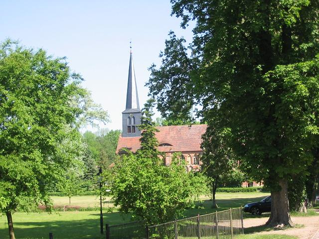 Kloster/Stift Marienfließ, Prignitz, Brandenburg. Klosterkirche und Park.